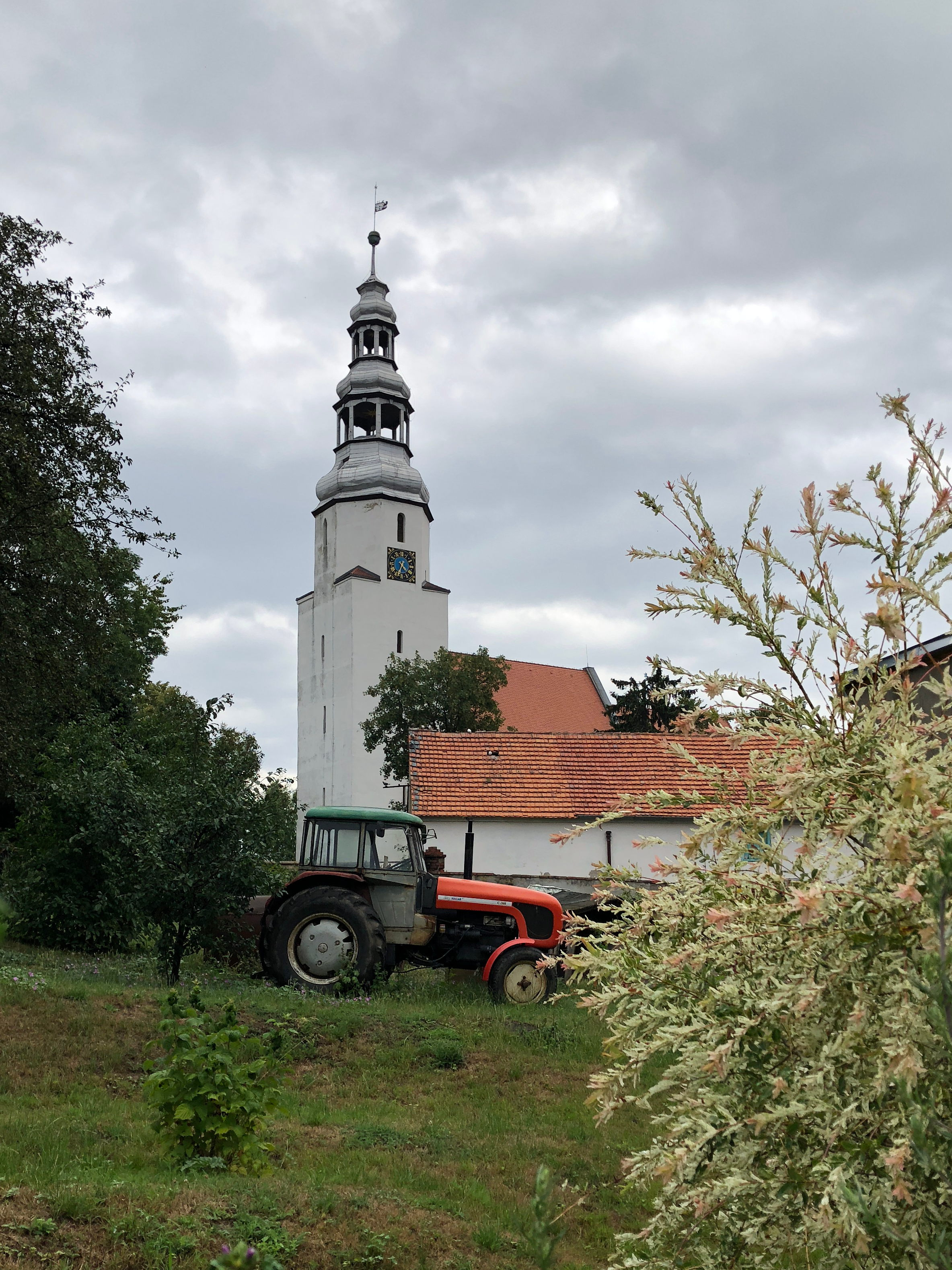 Kościół Wniebowzięcia NMP w Mierczycach (zabytek nr rejestr. A/2225/708)